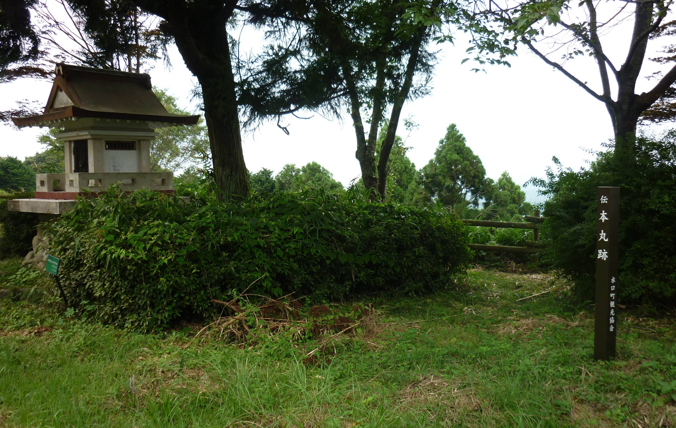 本丸跡